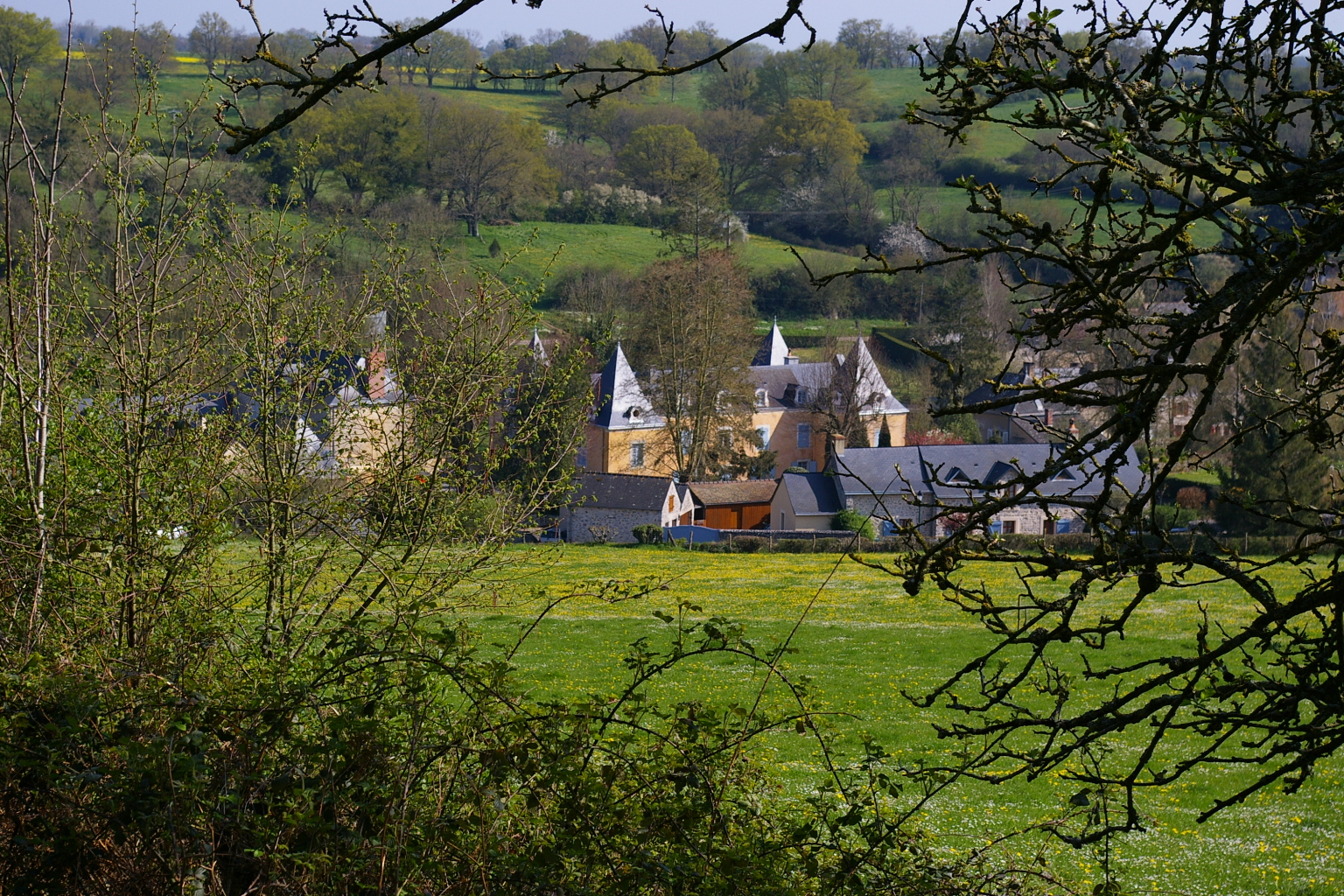 Saint-Pierre-sur-Erve